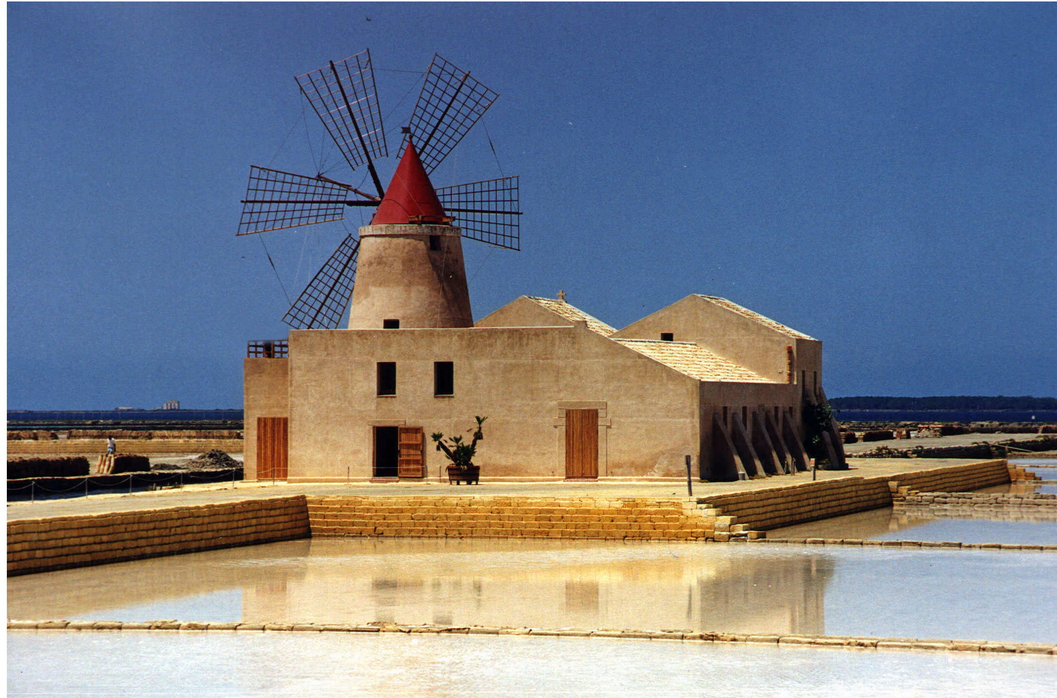 Vindmølle ved saltverkene sør for Trapani. Foto: AEK.